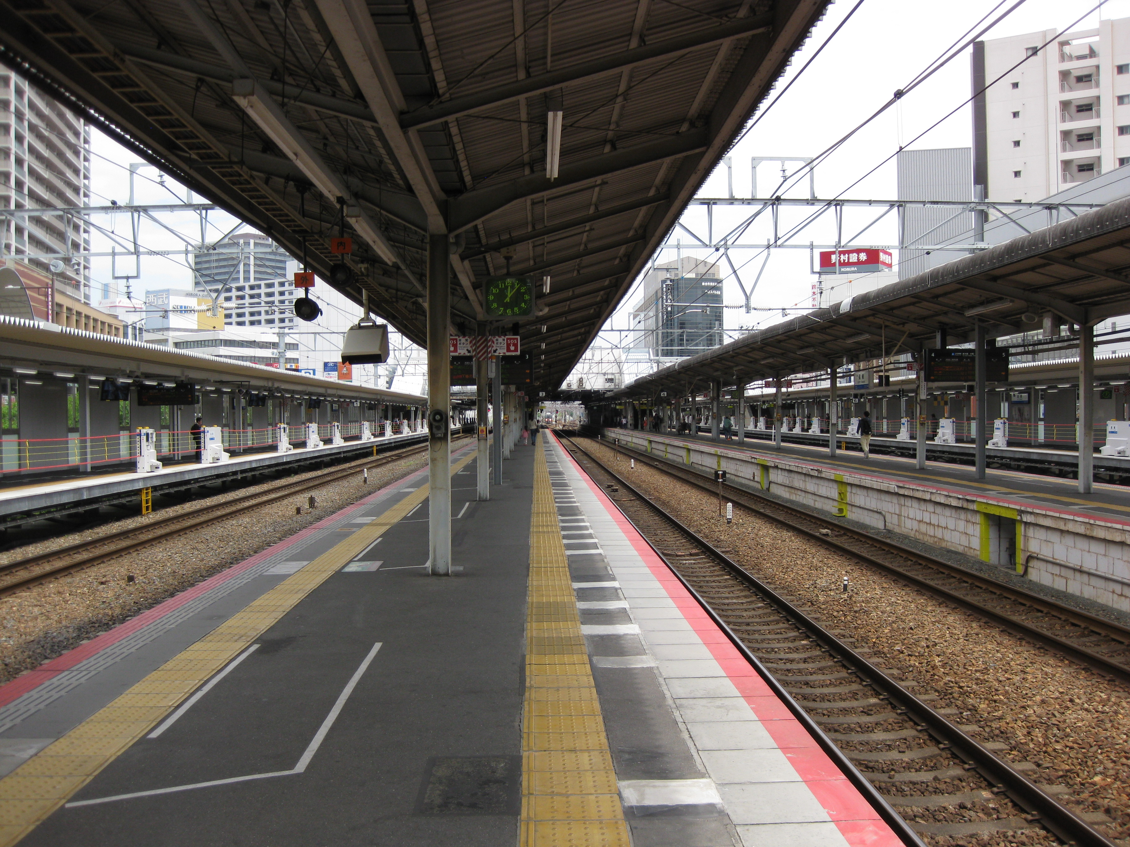 新快速用のホームが増設された後のja:高槻駅